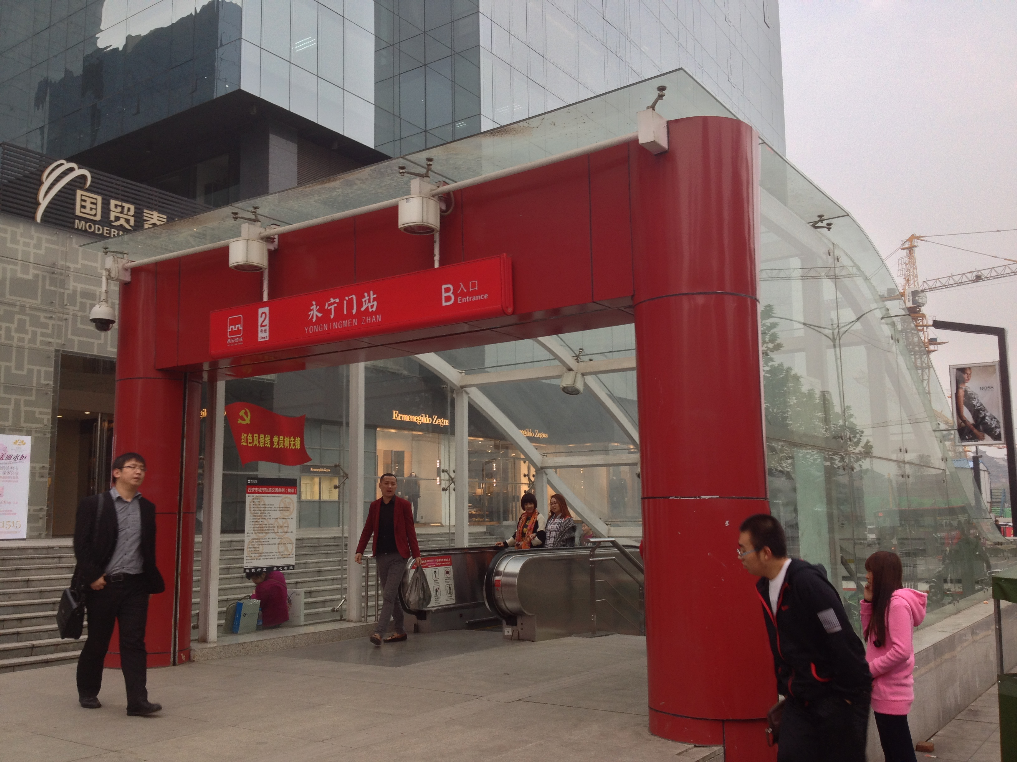 中文（中国大陆）: 西安地铁车站